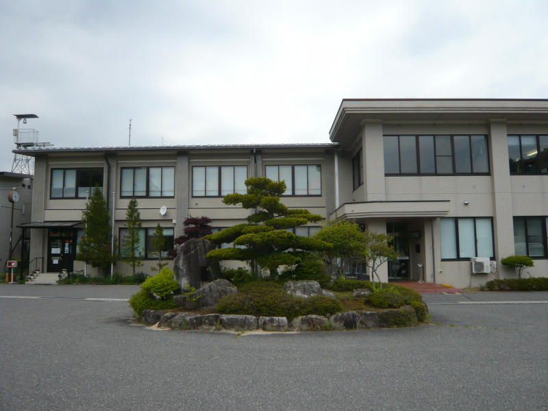 売木村役場